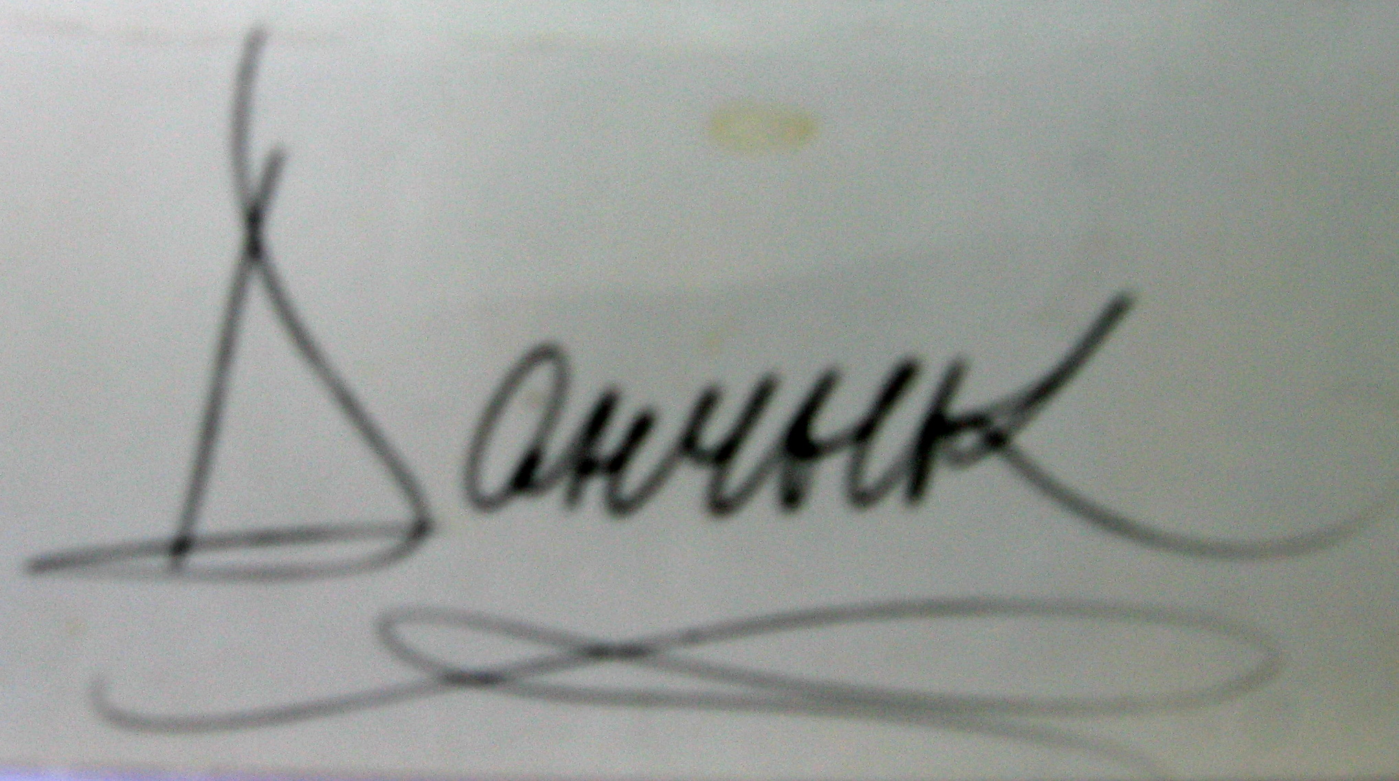 Аўтограф Данчыка